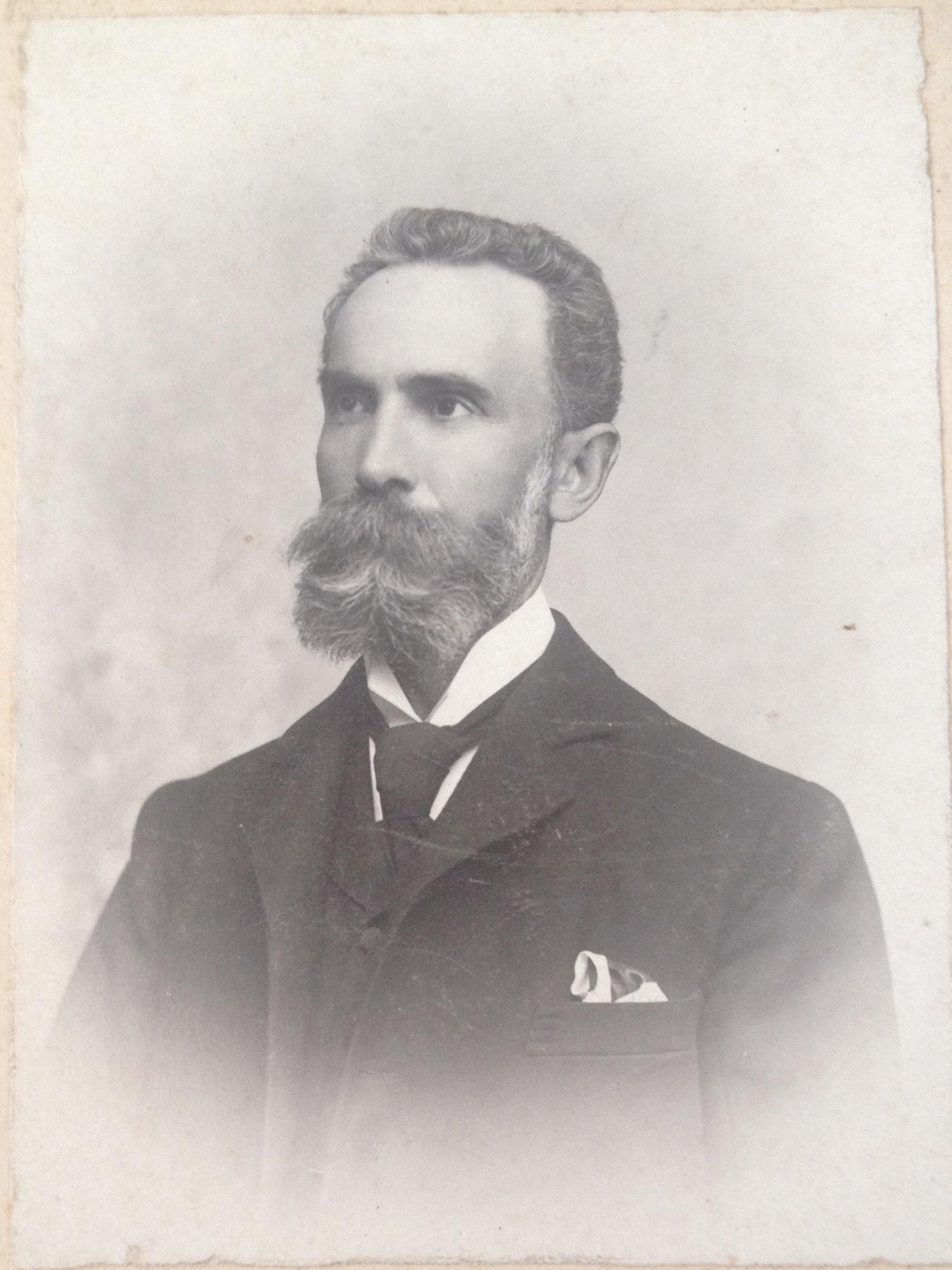 Foto di Mario Alessi